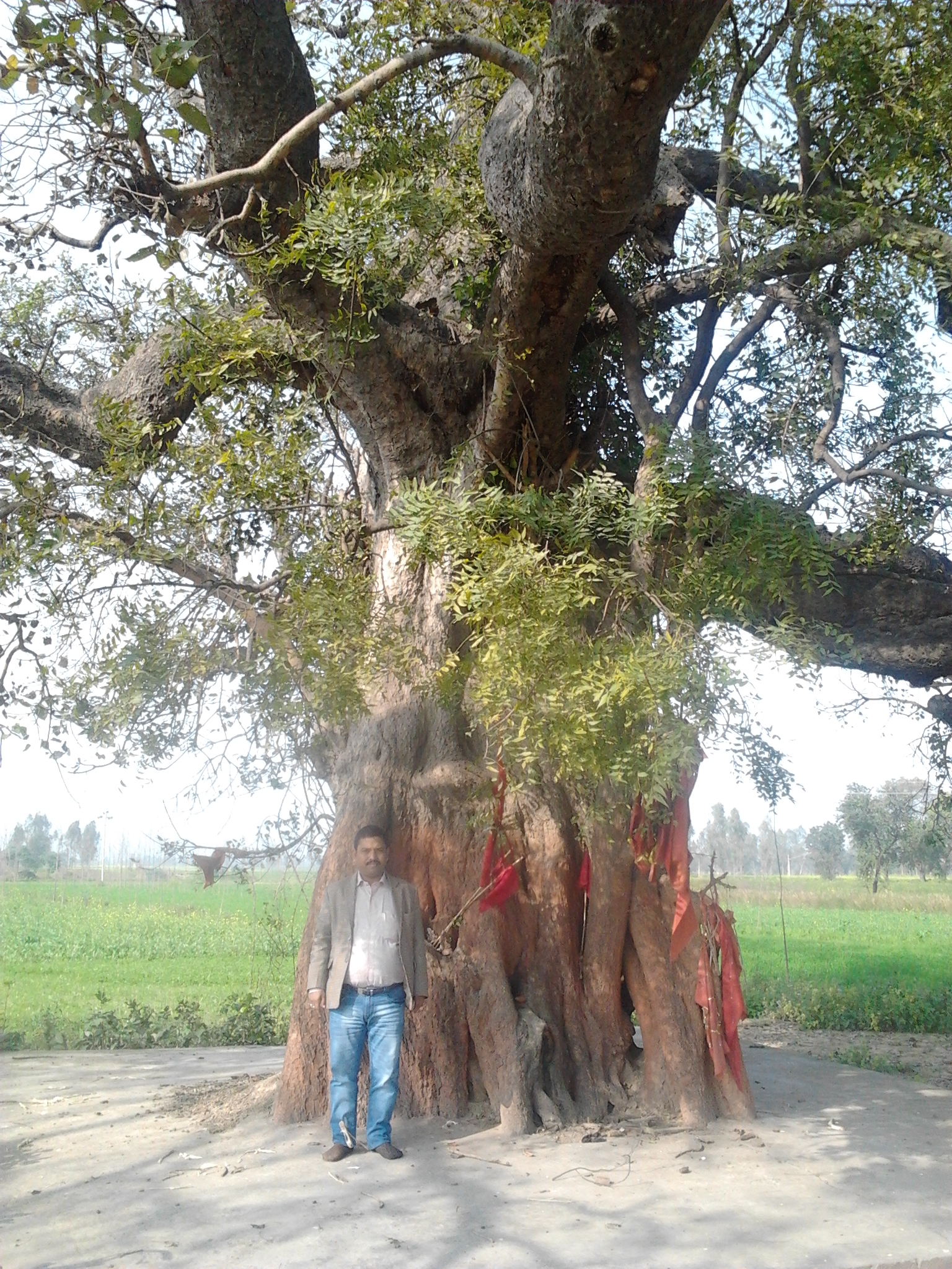 ग्राम तिलोकपुर जिला शाहजहाँपुर स्थित एक हजार वर्ष पुराना पीपल वृक्ष जिसे श्रद्धालु जनता ब्रह्मदेव के नाम से पूजती है।